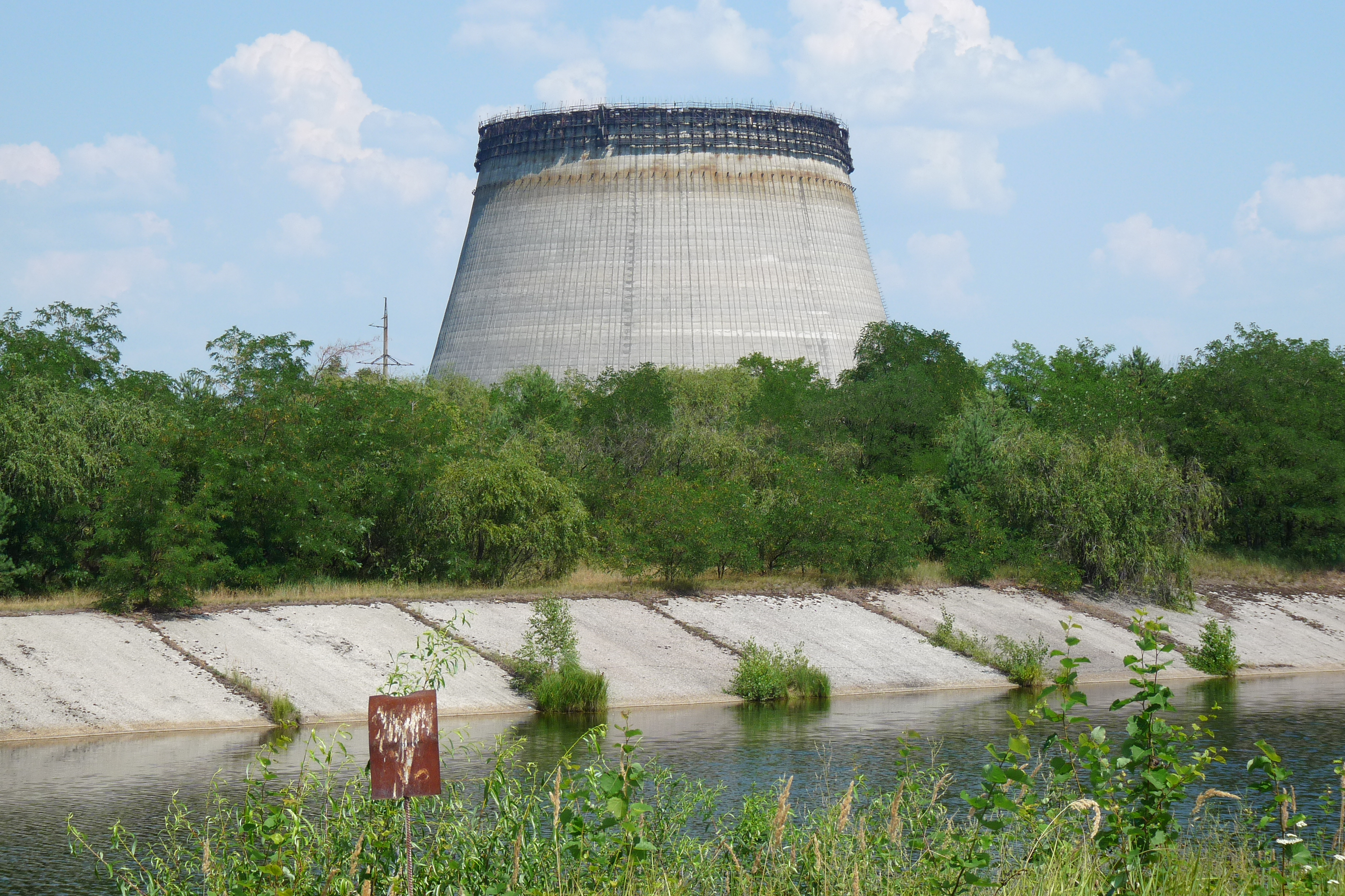 Chernobyl